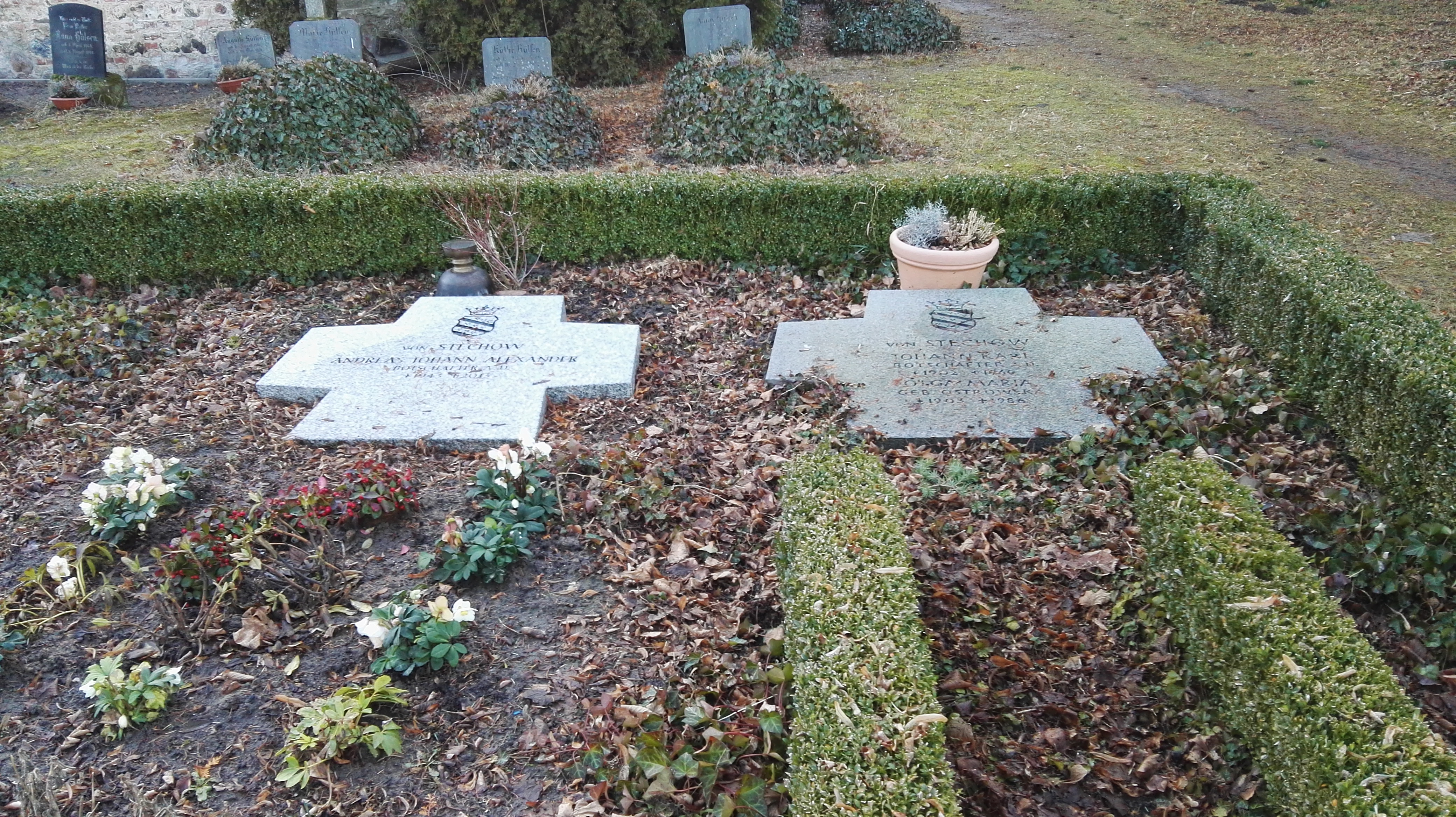 Gräber von Johann Karl von Stechow und Andreas von Stechow auf dem Friedhof Stechow; Gemeinde Stechow-Ferchesar